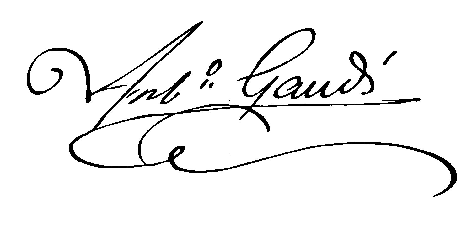 Firma de Gaudí